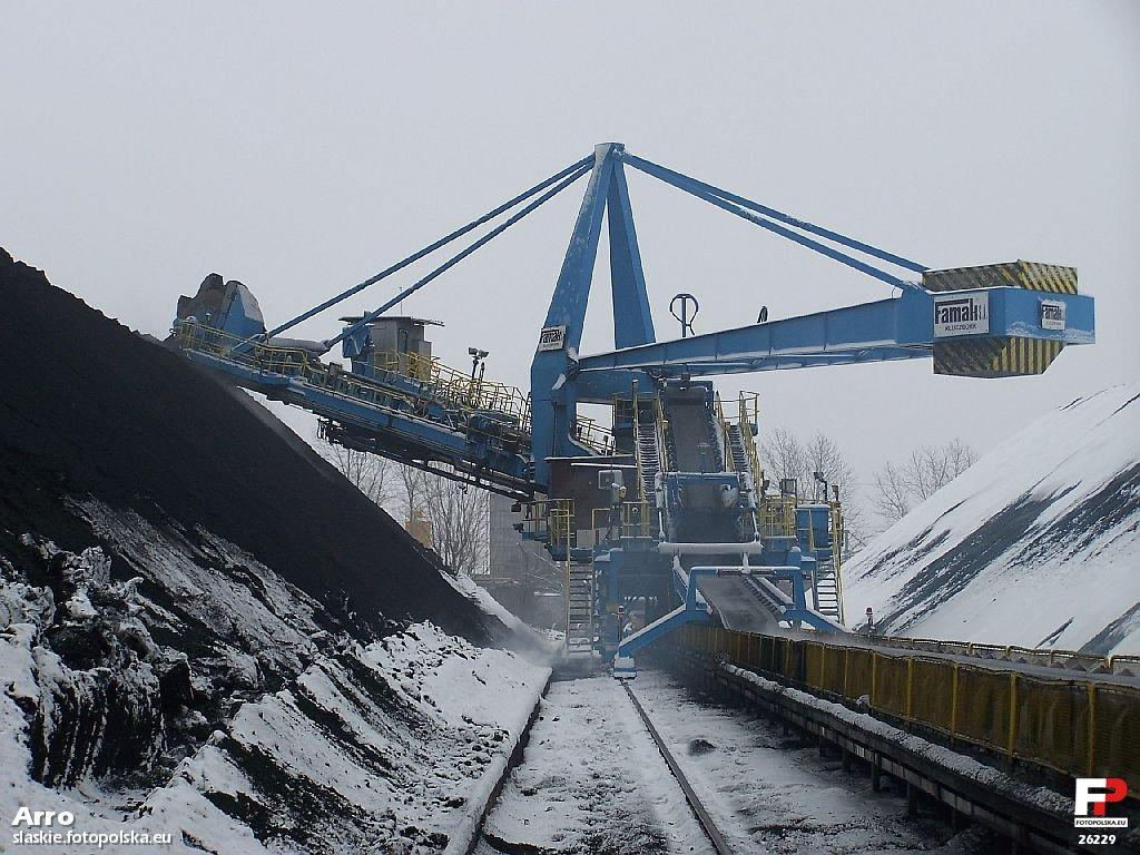 Ładowarko - zwałowarka (konstrukcja FAMAK - Kluczbork) podczas podawania węgla...